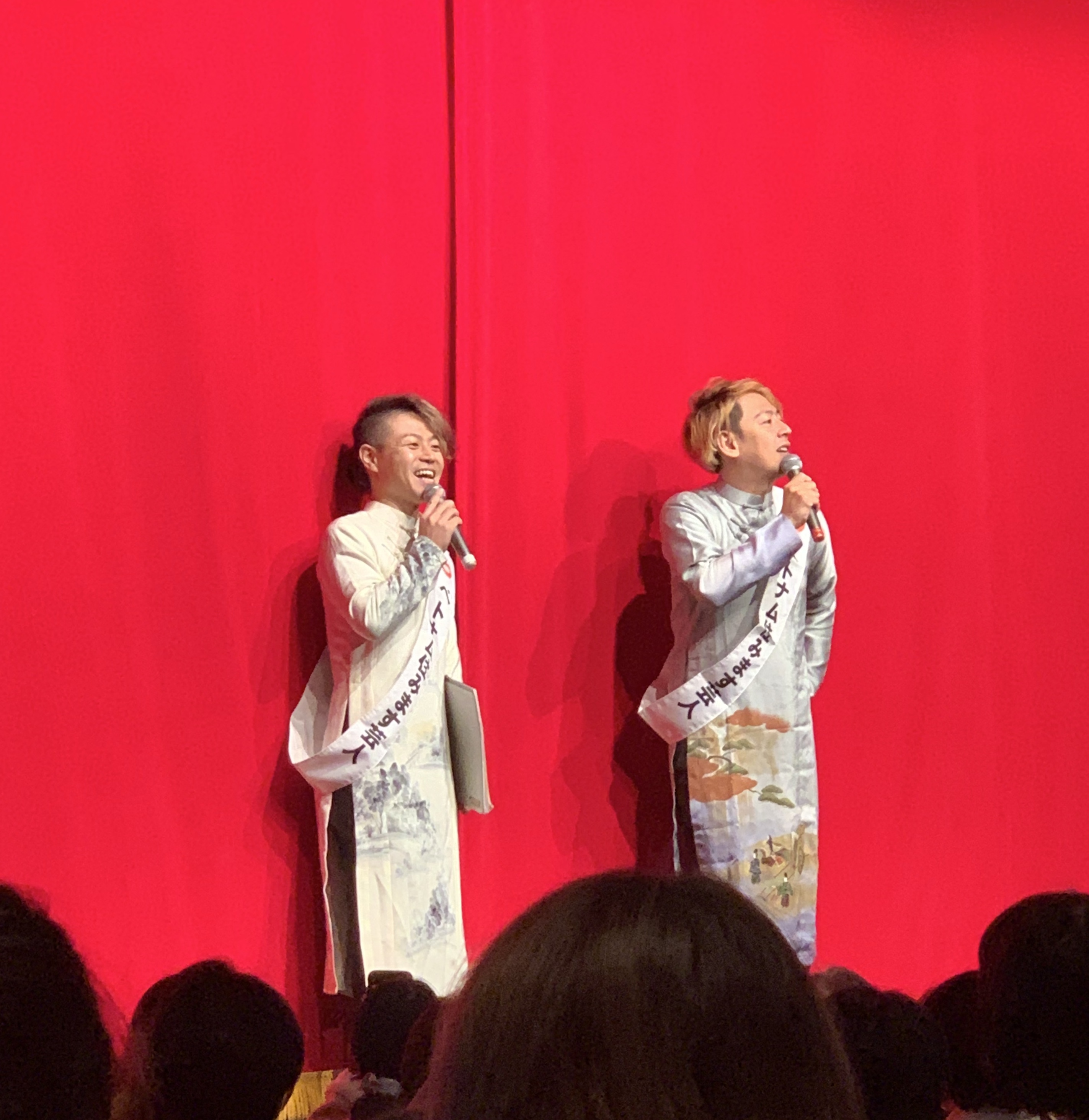 ルミネtheよしもと で撮影